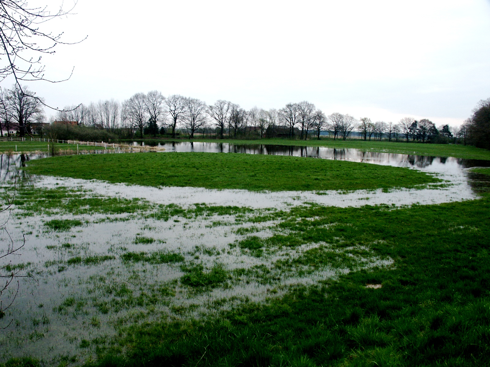 Der Burghügel hebt sich in der überfluteten Wiese ab